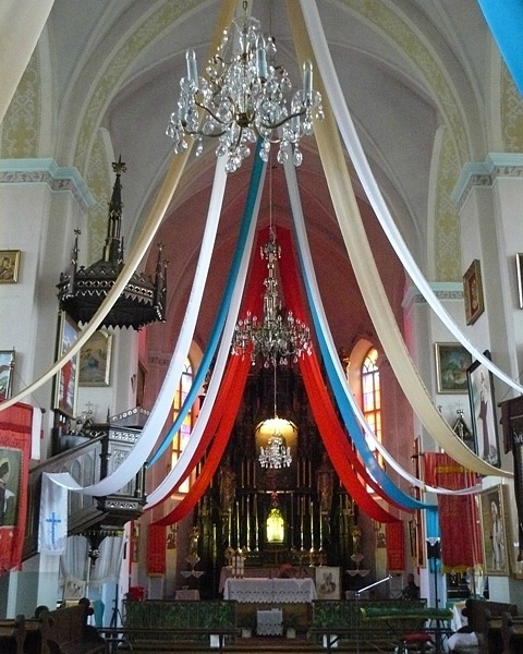 костел Вознесения Девы Марии, Красное, Молодечненский район. Фото путешествия по Беларуси.